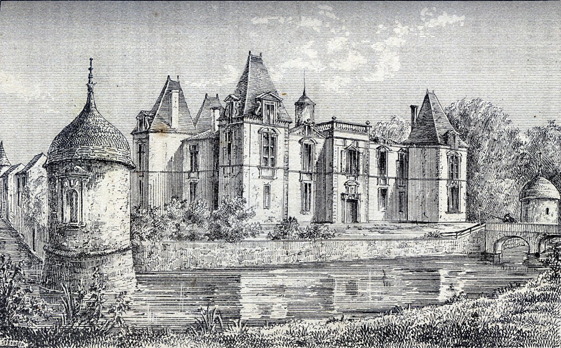 Illustration du Château d'Issan dans l'ouvrage Bordeaux et ses vins classés par ordre de mérite (2ème édition) de Charles Cocks et Edouard Féret publié en 1868